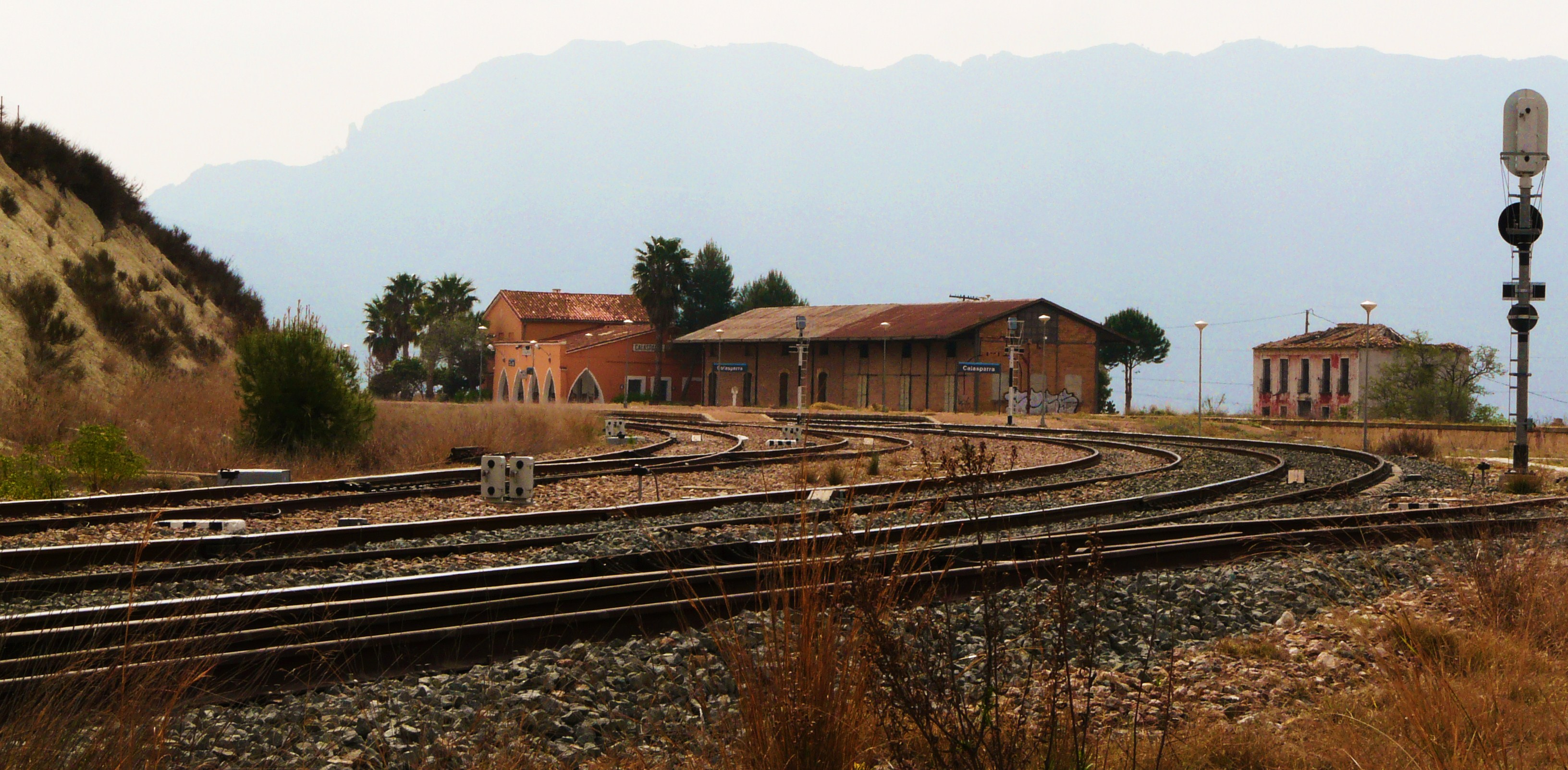 una estacion de tren diferente a todas